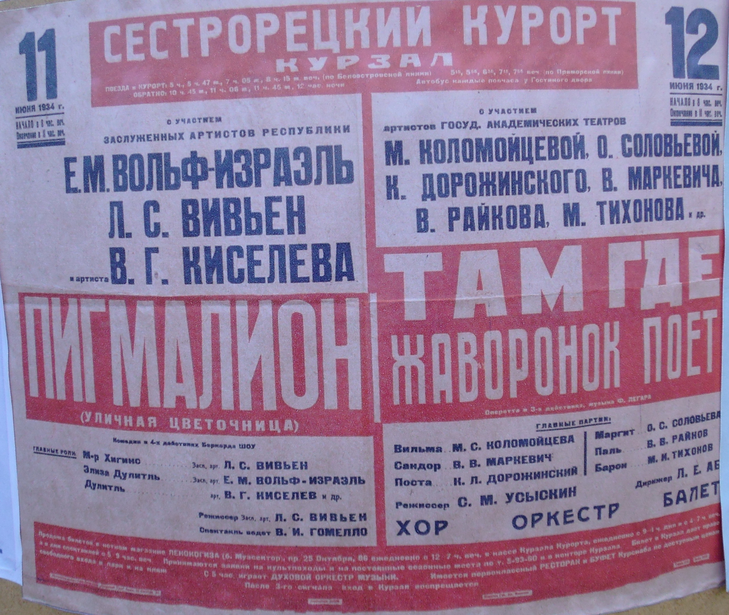 Сестрорецкий курзал афиша